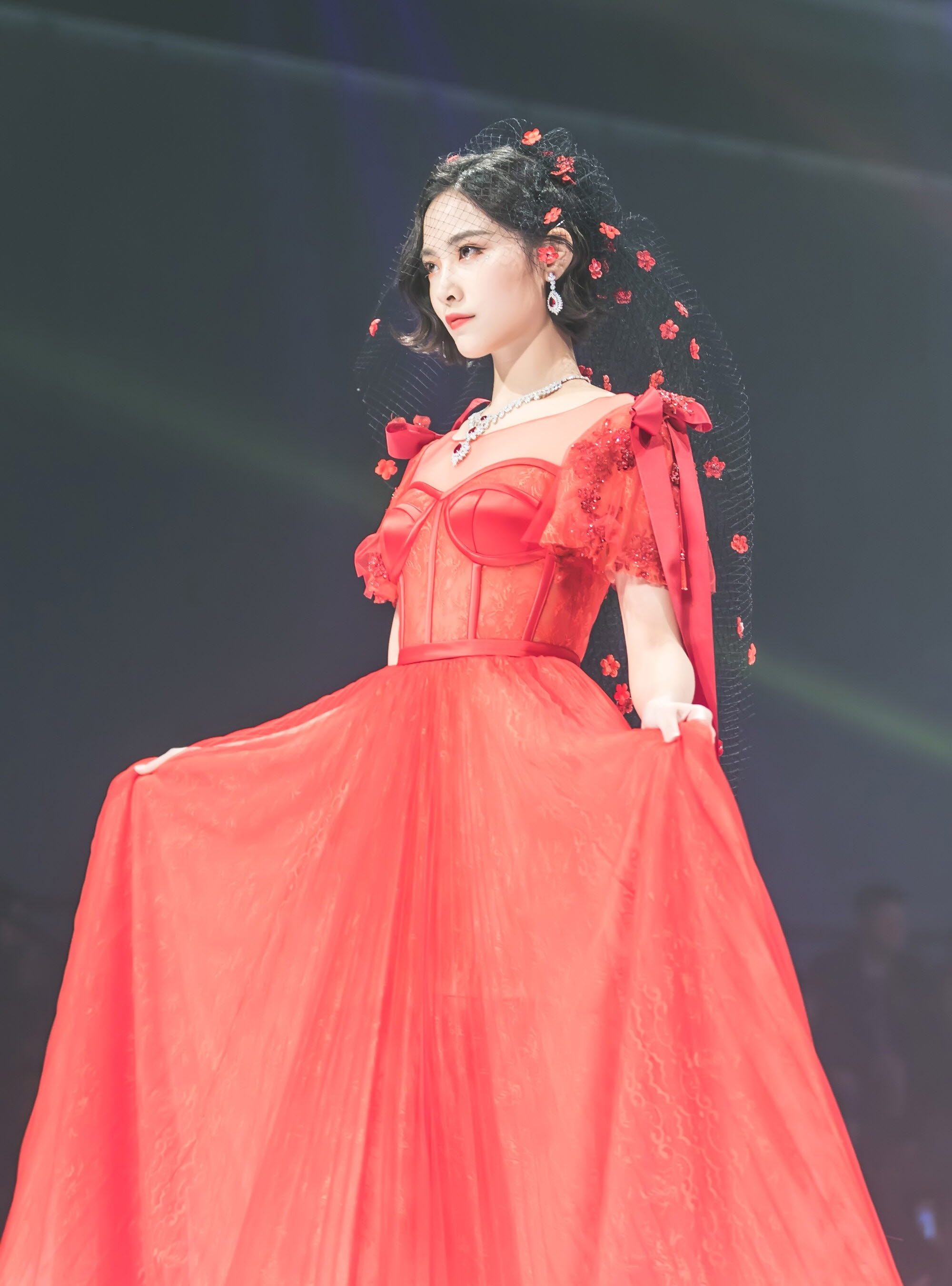 17.11.18 风尚大赏 许佳琪 3P